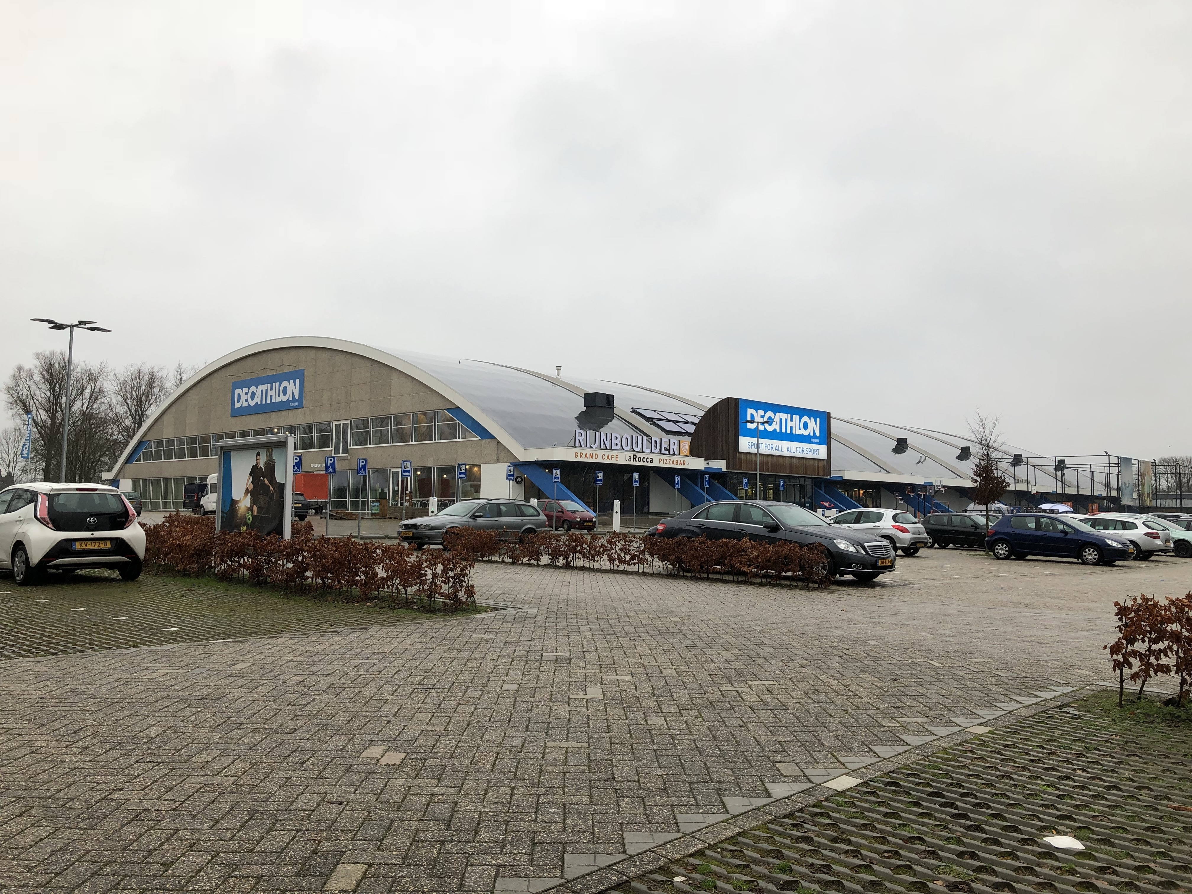 De Rijnhal met de Decathlon en Rijnboulder.